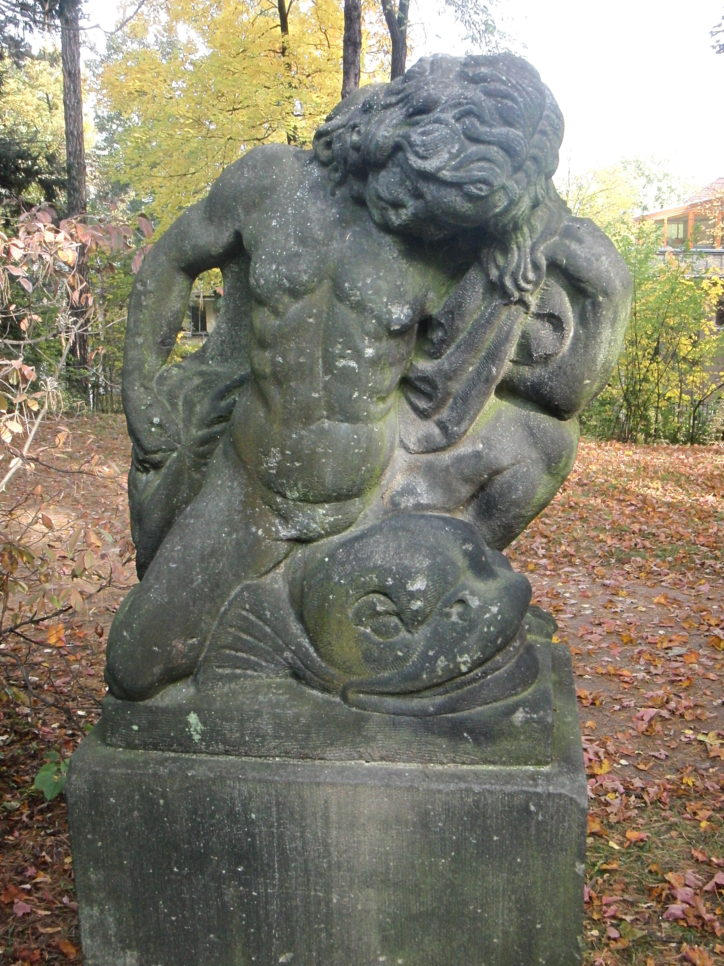 Weschke, Franz – 1930 , Kinderfigurengruppe "Kind mit Delphin" im Westendpark Dresden, 1937 in Fichtepark umbenannt.